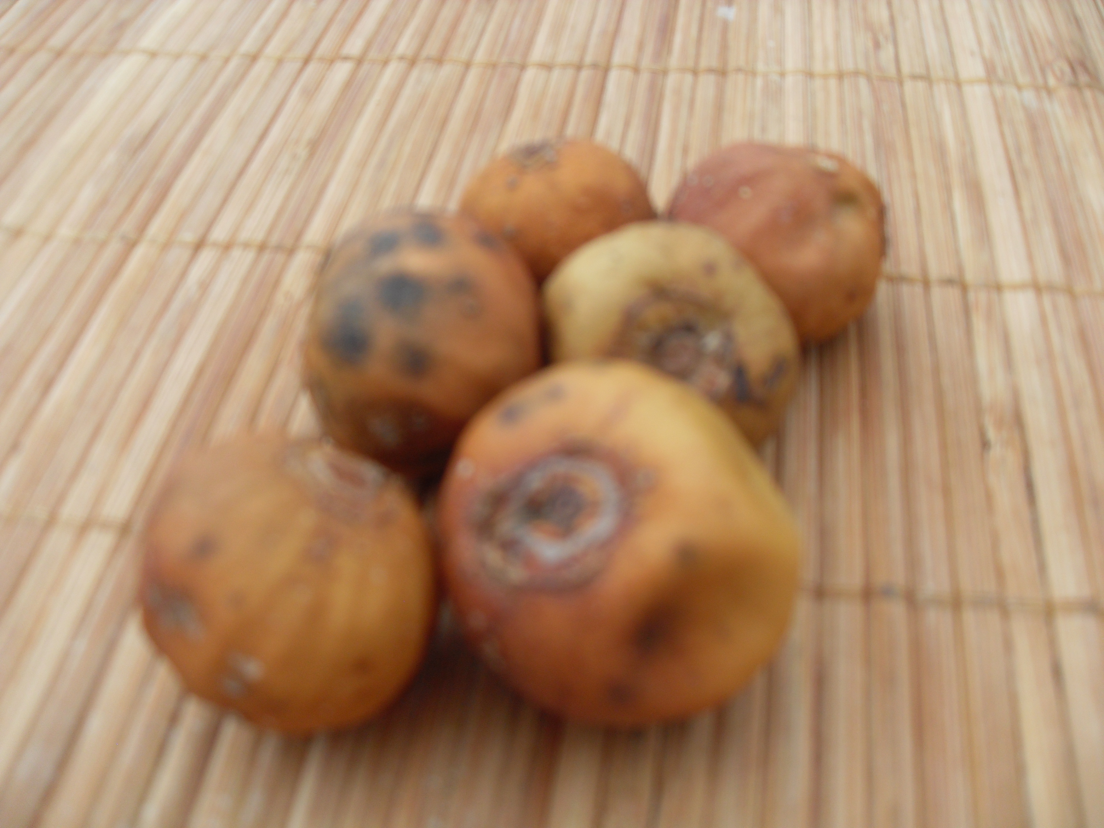 Vavangueria madagascariensis